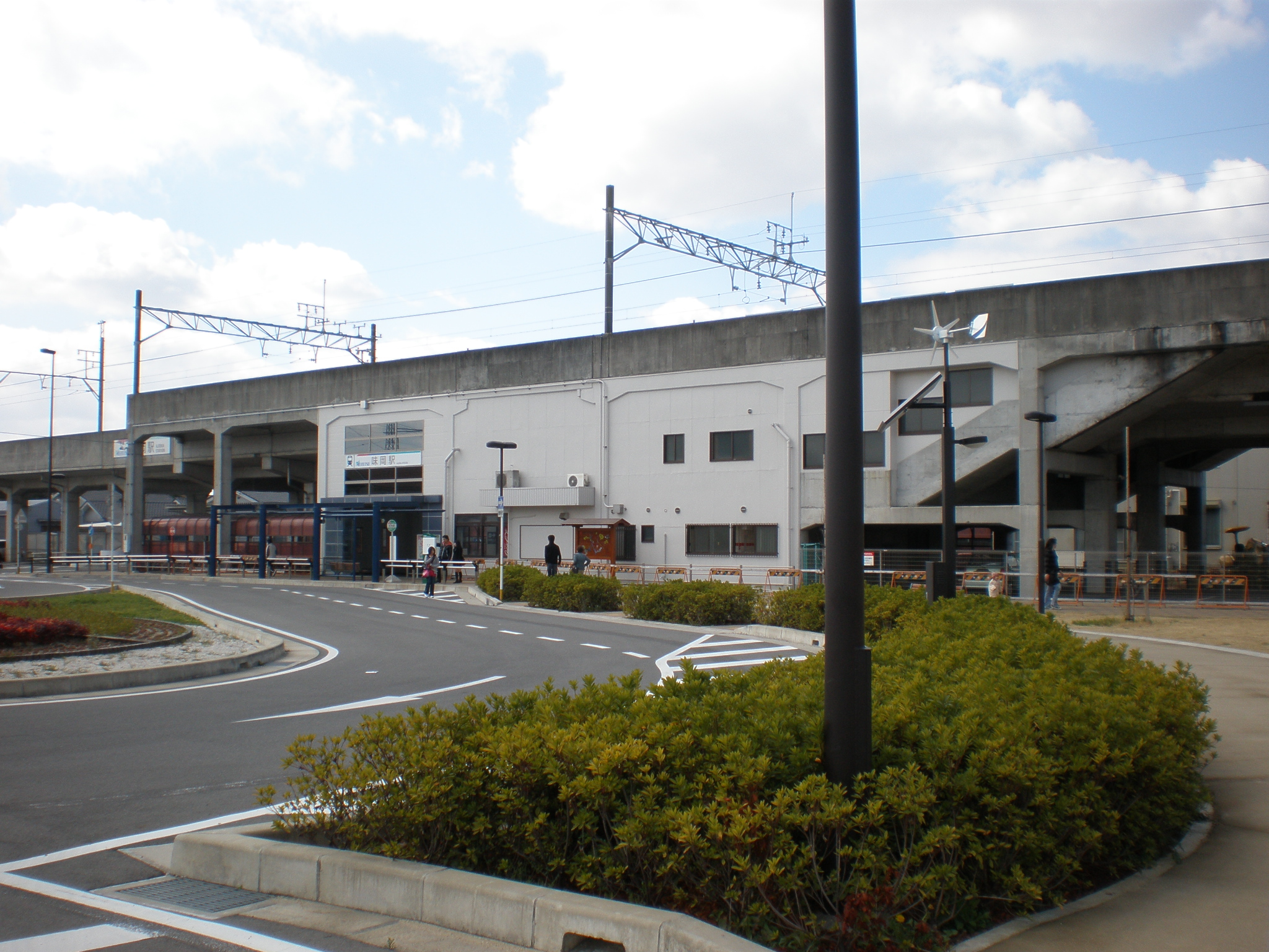 愛知県小牧市にある味岡駅